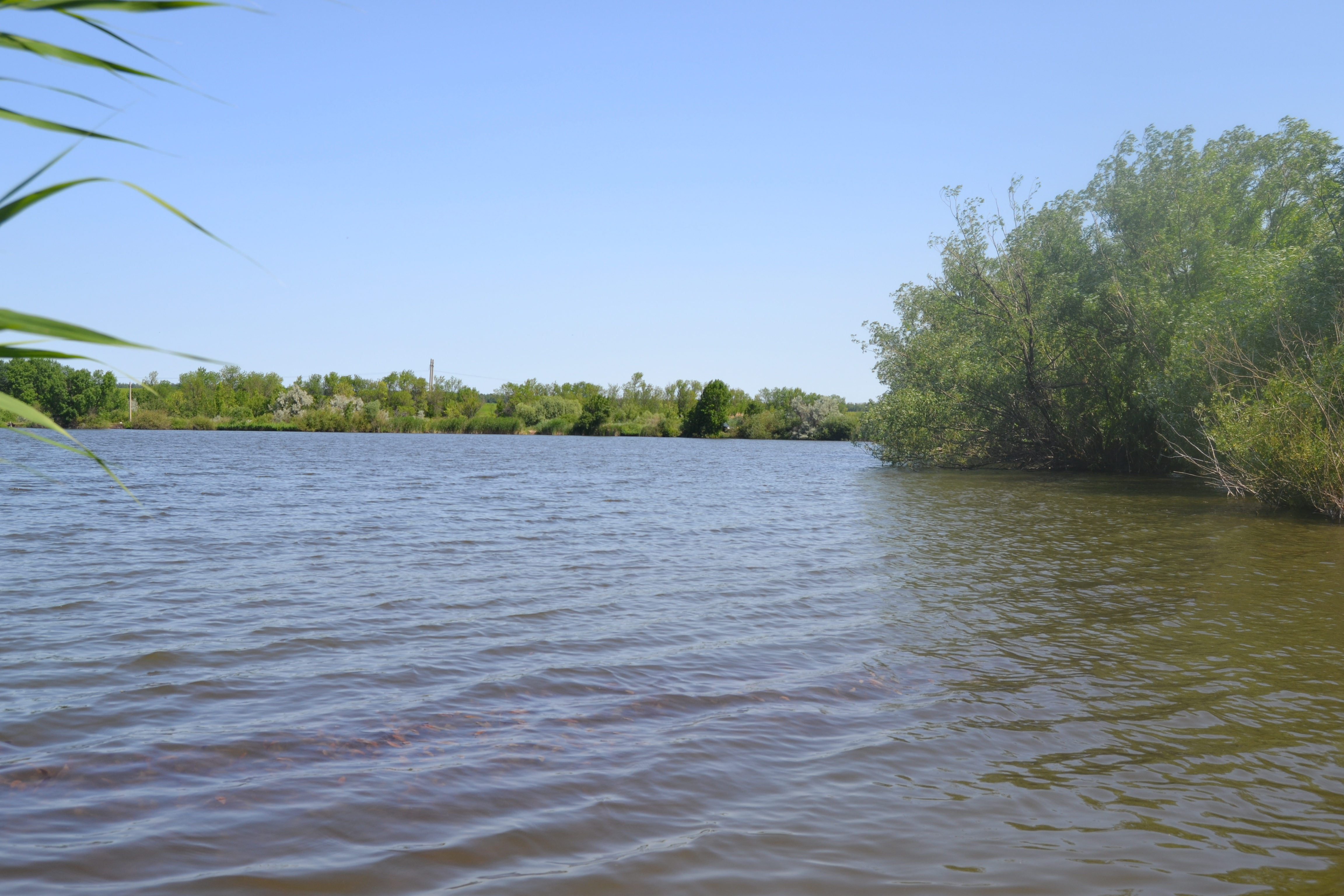 Изображение населённого пункта. Пруд (Козлаковка, Саратовский район)